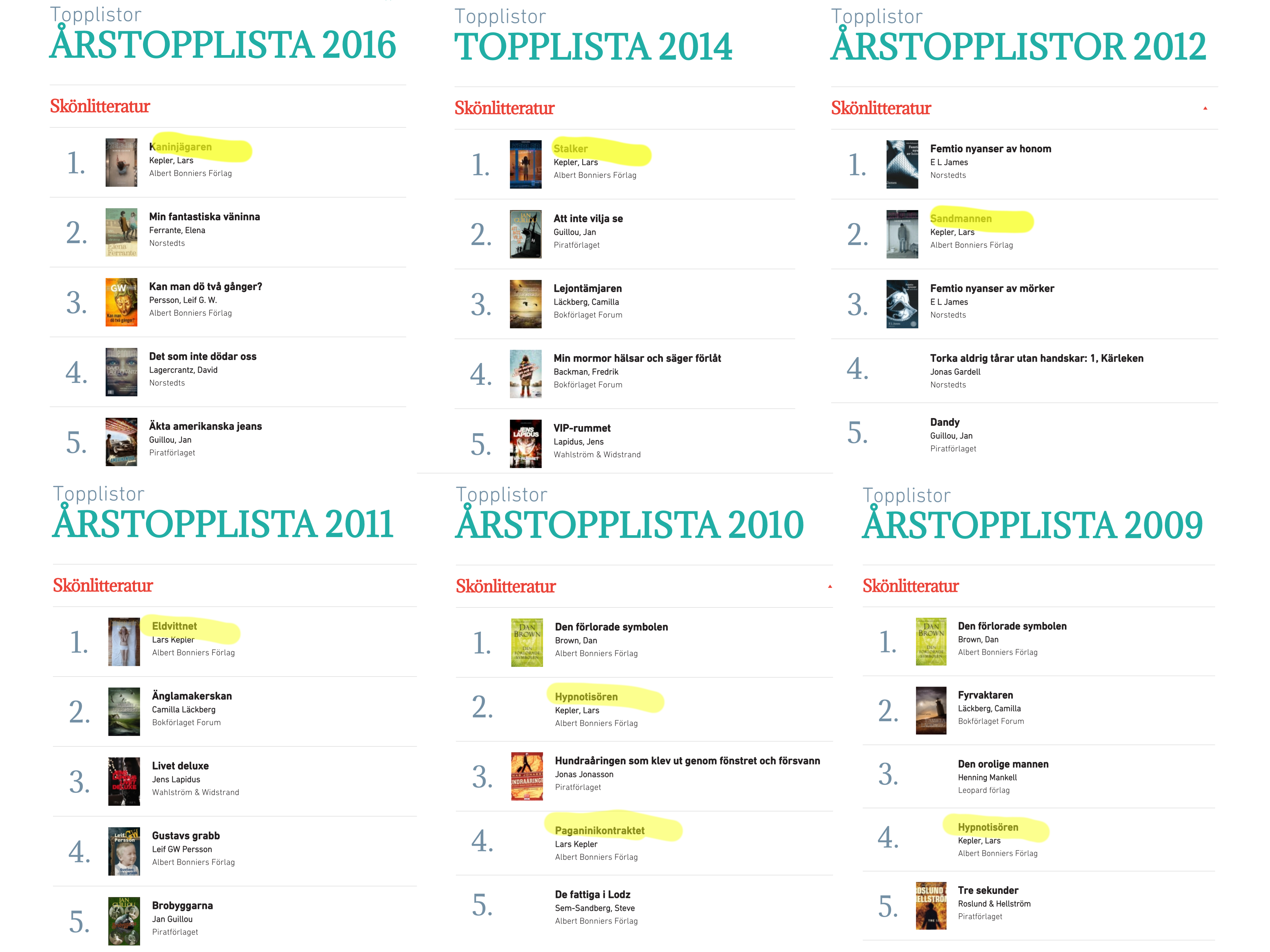 Text och ikoner över placeringar på Svensk Bokhandels listor